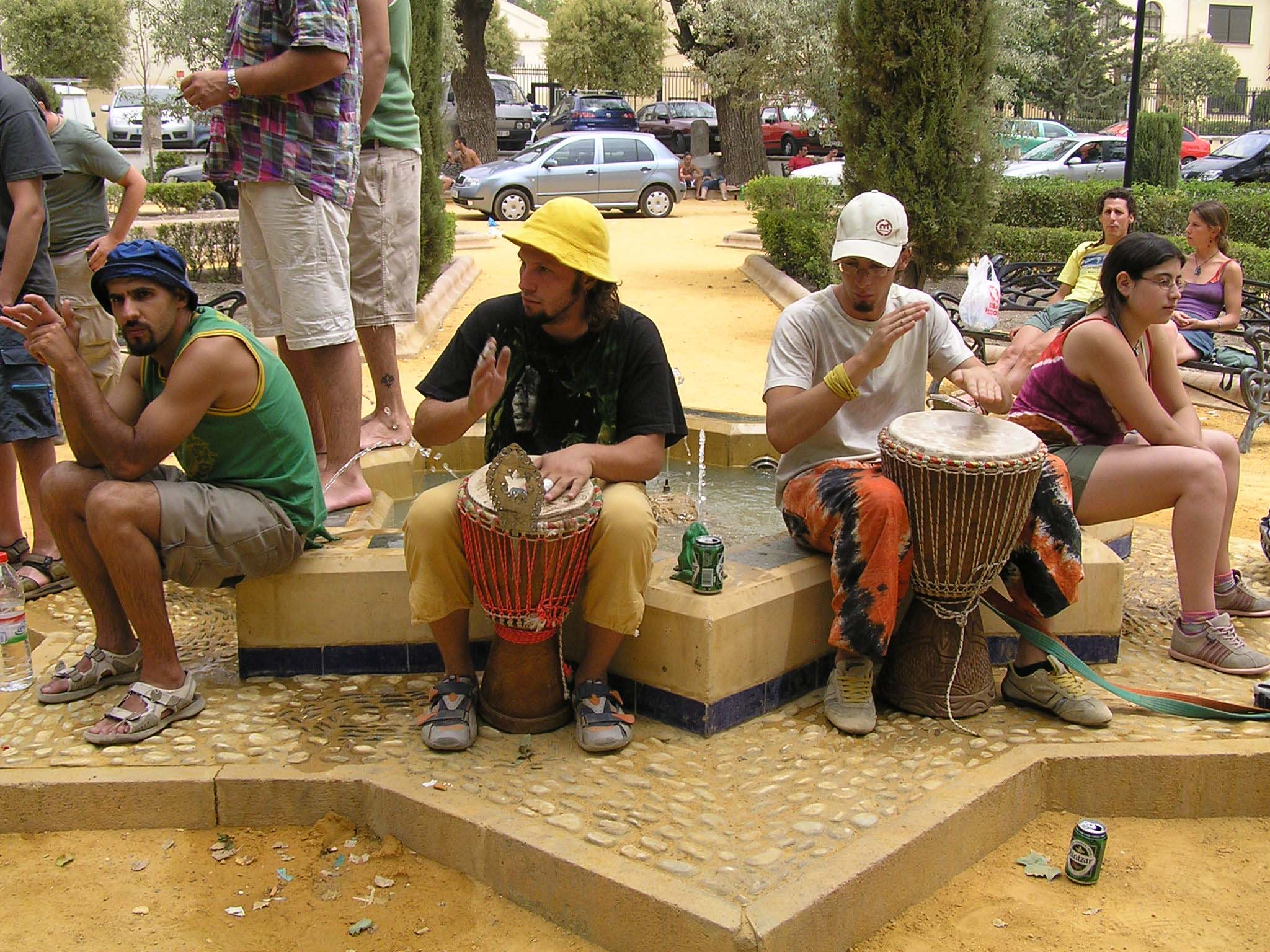 Planeta EtnoSur Etnosur, Alcalá la Real.